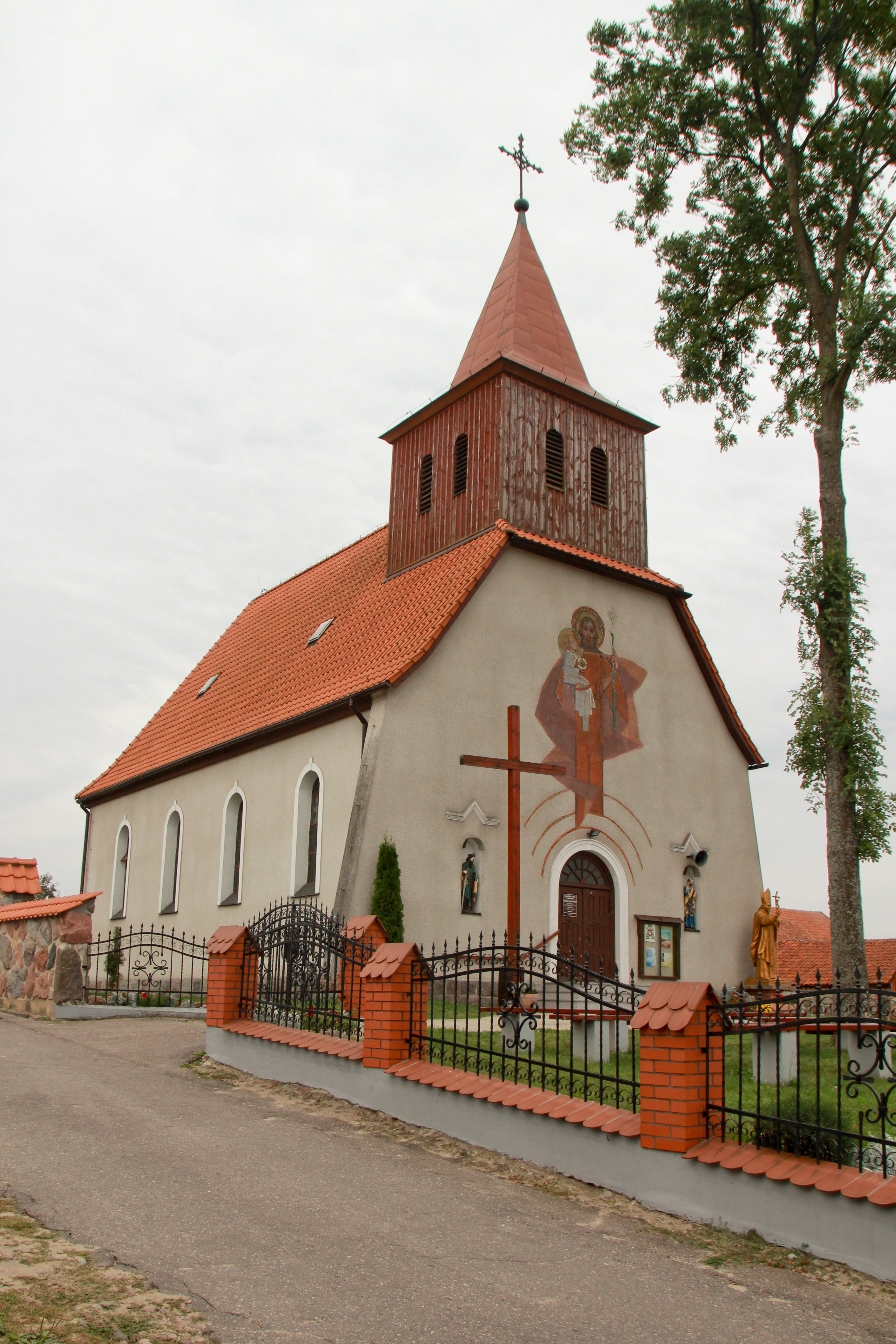 Kościół św. Józefa i Matki Bożej Częstochowskiej w Jedwabnie - wieś w Polsce w województwie warmińsko-mazurskim, w powiecie szczycieńskim, w gminie Jedwabno.